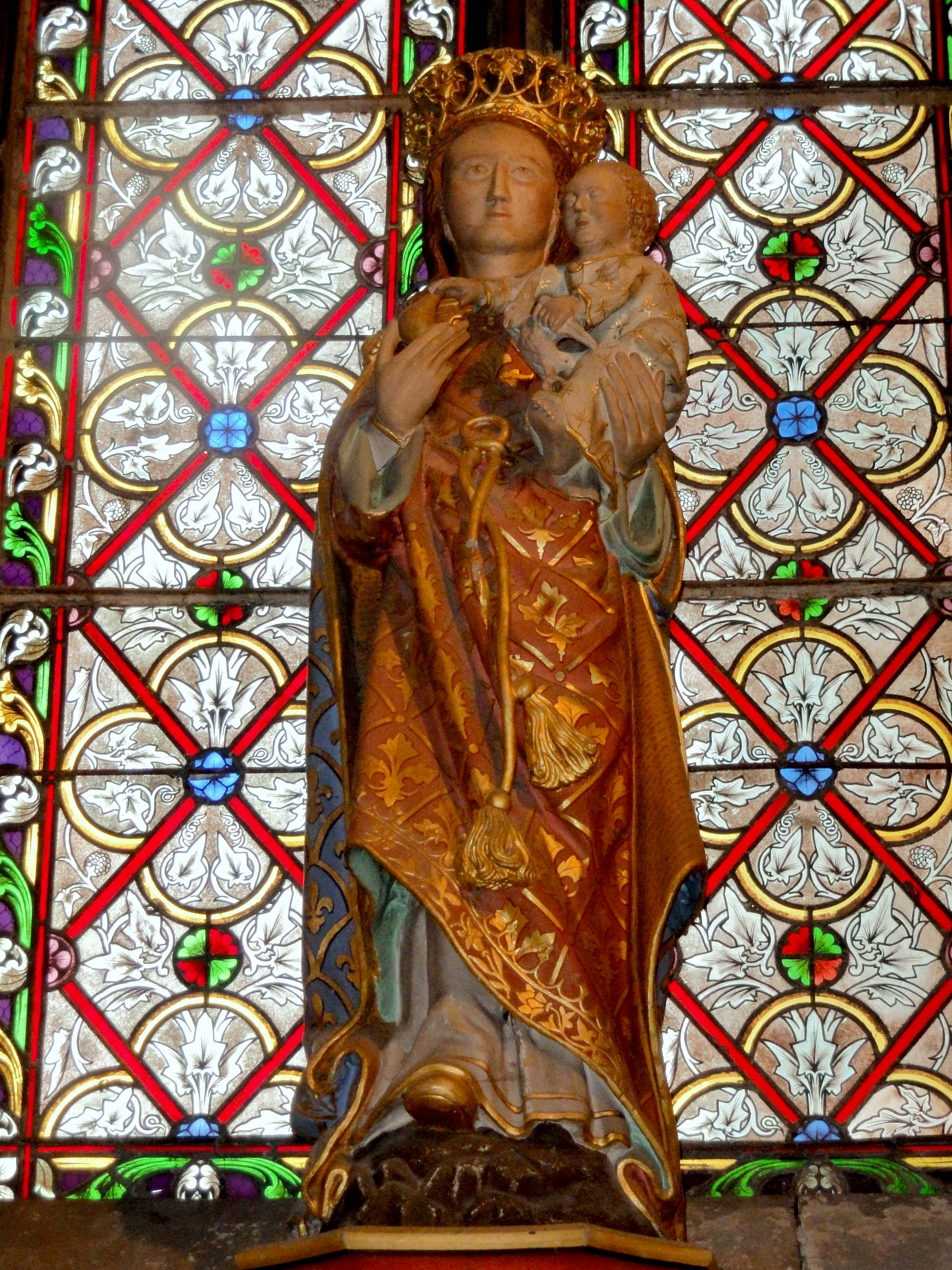 Vierge à l'Enfant du XVe siècle, repeinte au XIXe siècle.